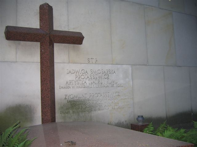 Jadwiga Smosarska's monument (Powązki Cemetery)